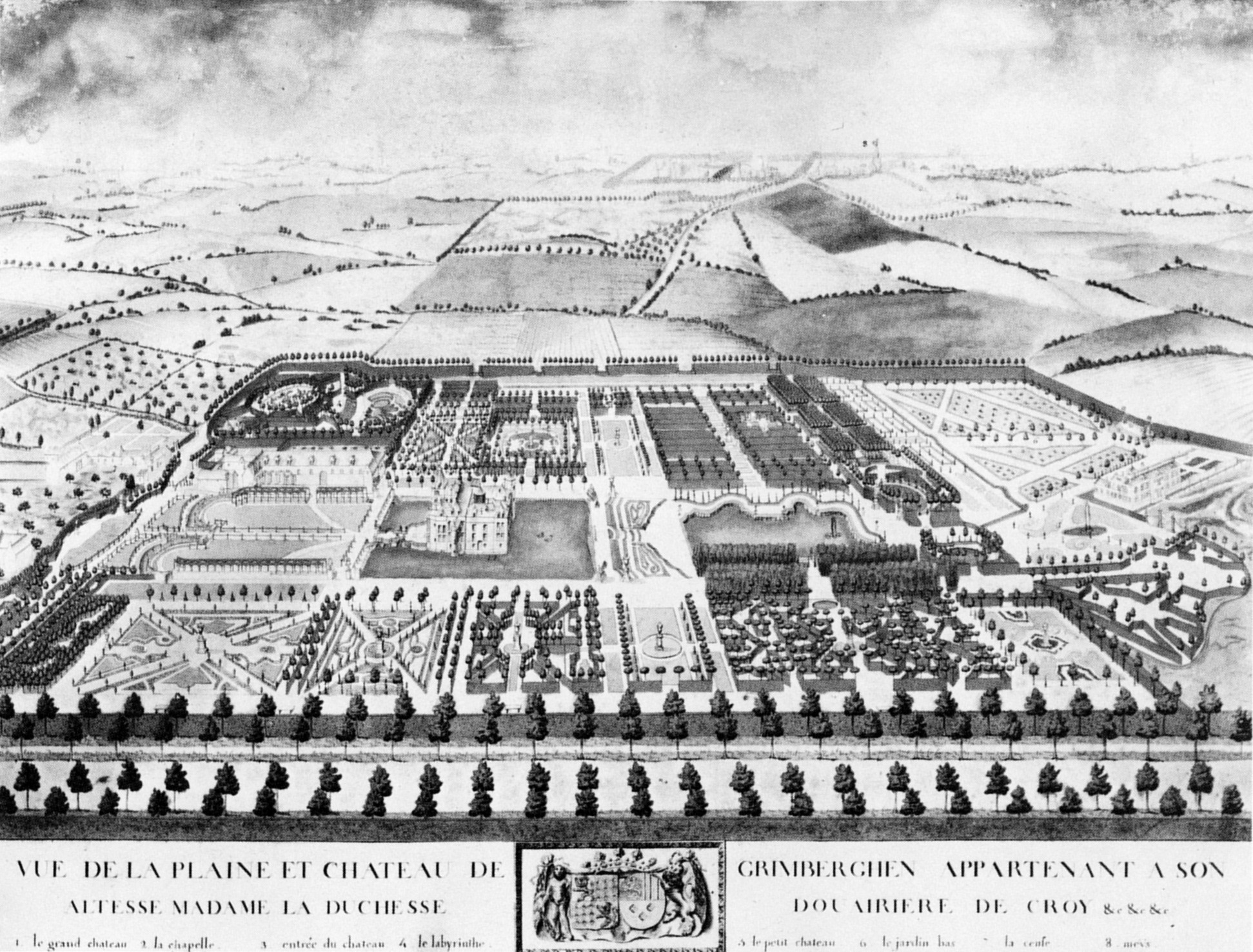 Schloss Grimbergen samt Schlosspark auf einem Aquarell